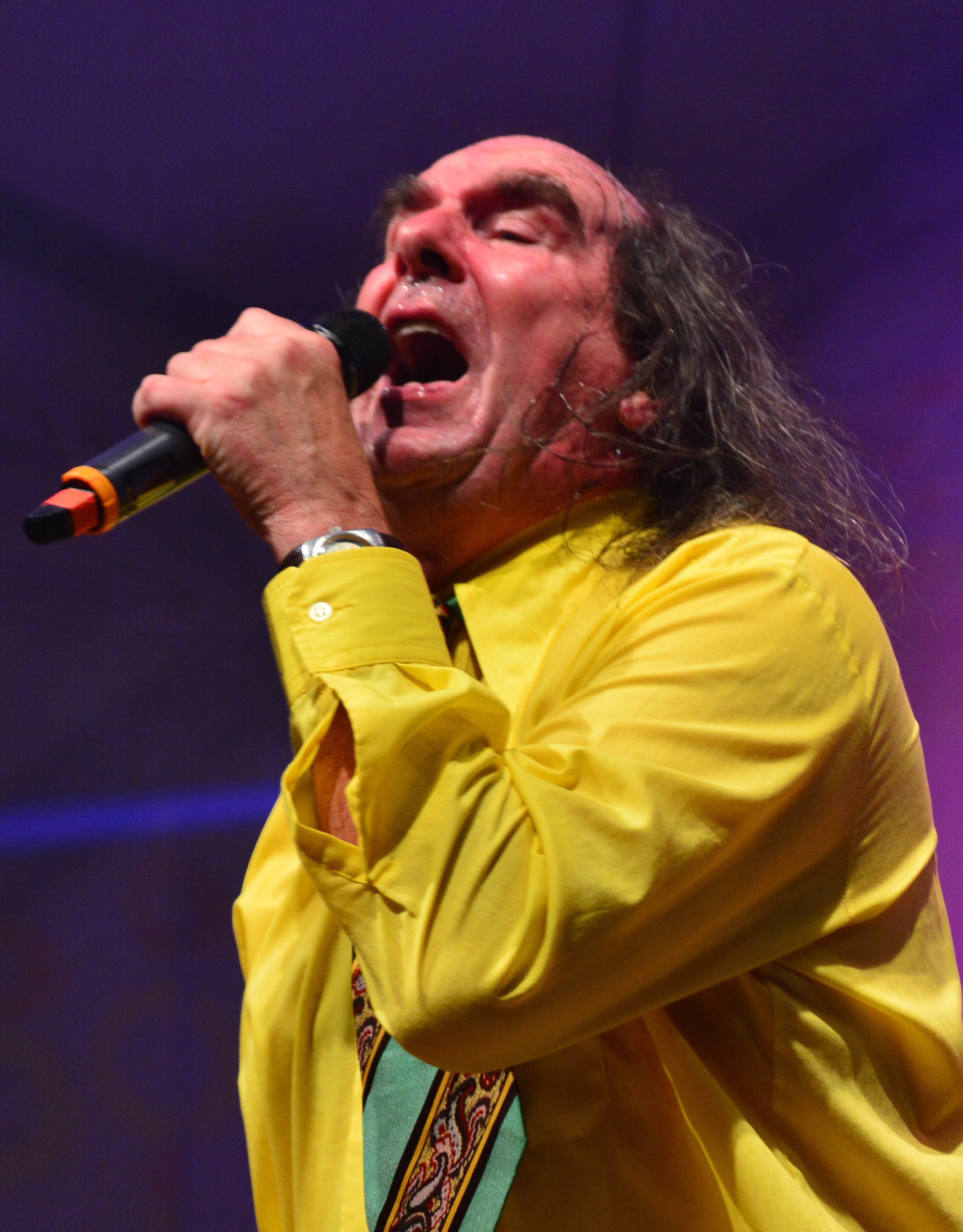 Guildo Horn beim Schlagermove 2015 in Hamburg